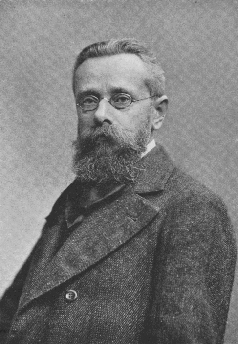 Hornjoserbsce: Adolf Černý (1864–1952) – spisowaćel, ludowědnik, słowjanski kulturny prócowar, diplomat Čěskosłowakskeje republiki a čěski přećel Serbow.